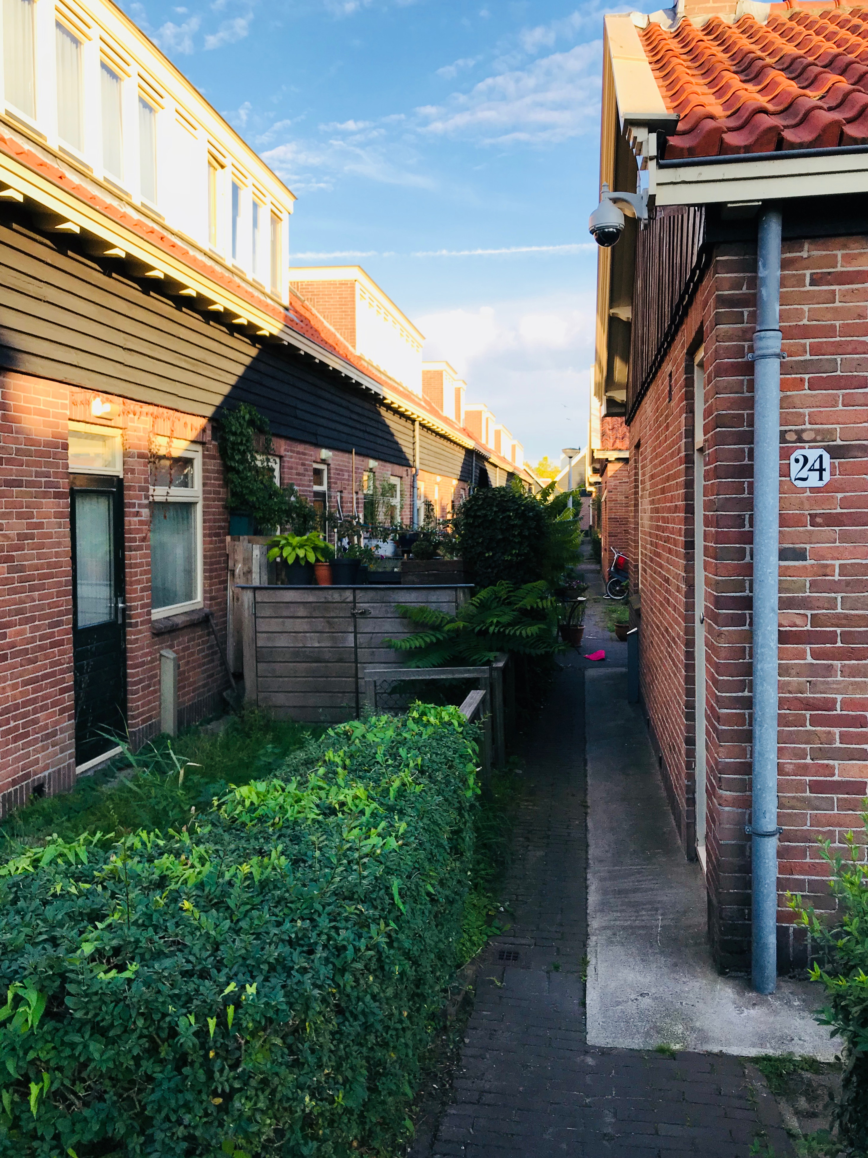 Achtertuinen Vogeldorp september 2018